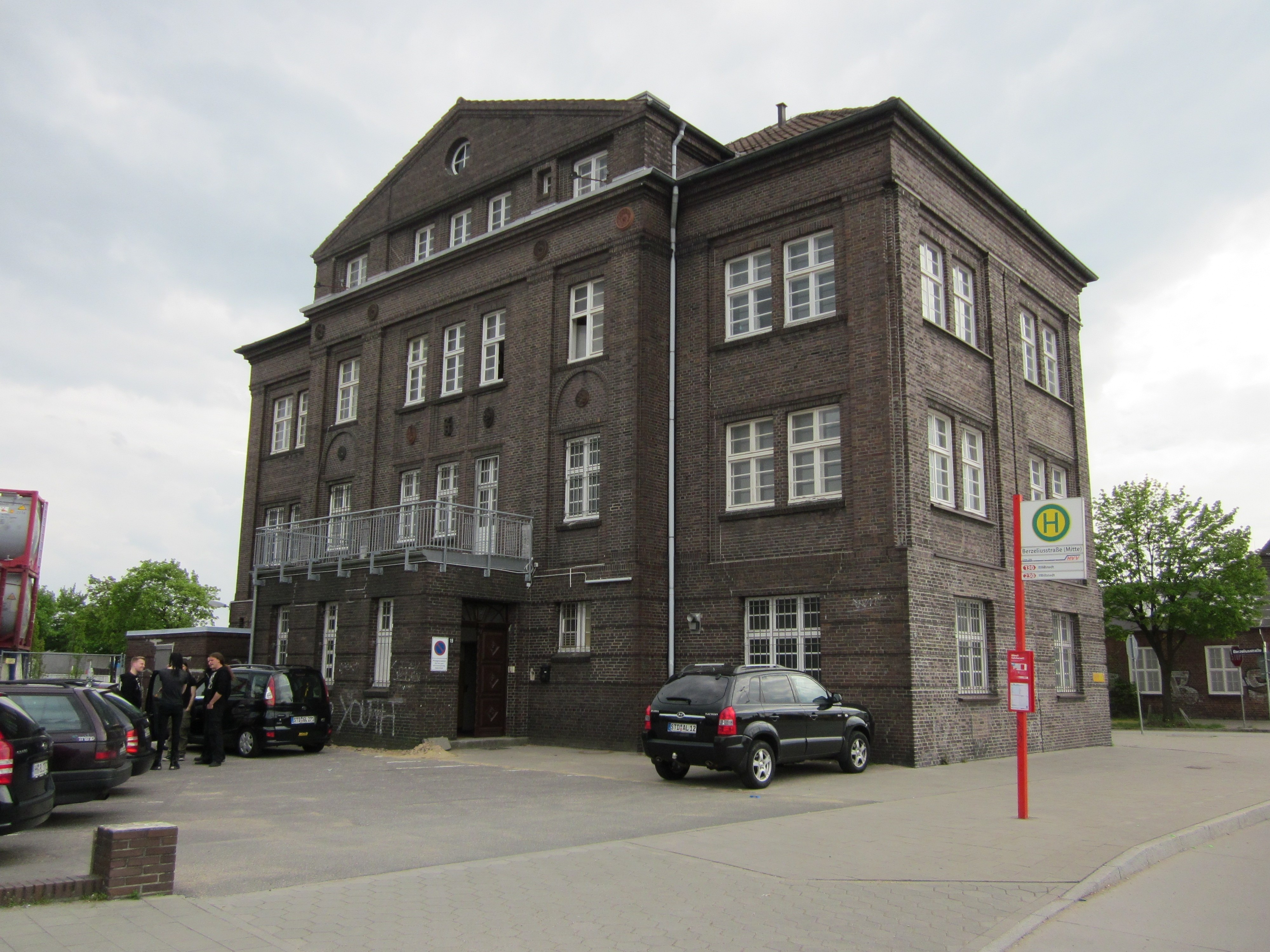 Die ehemalige Polizeirevierwache 92 in der Moorfleeter Straße 19 in Billbrook dient heute als eines der wenigen Wohngebäude im Stadtteil.